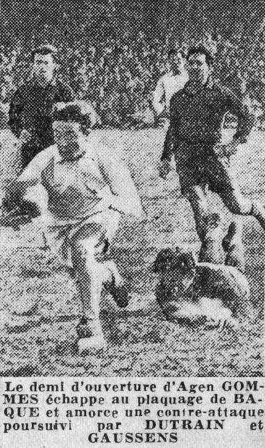 1947, finale du championnat de France de rugby.